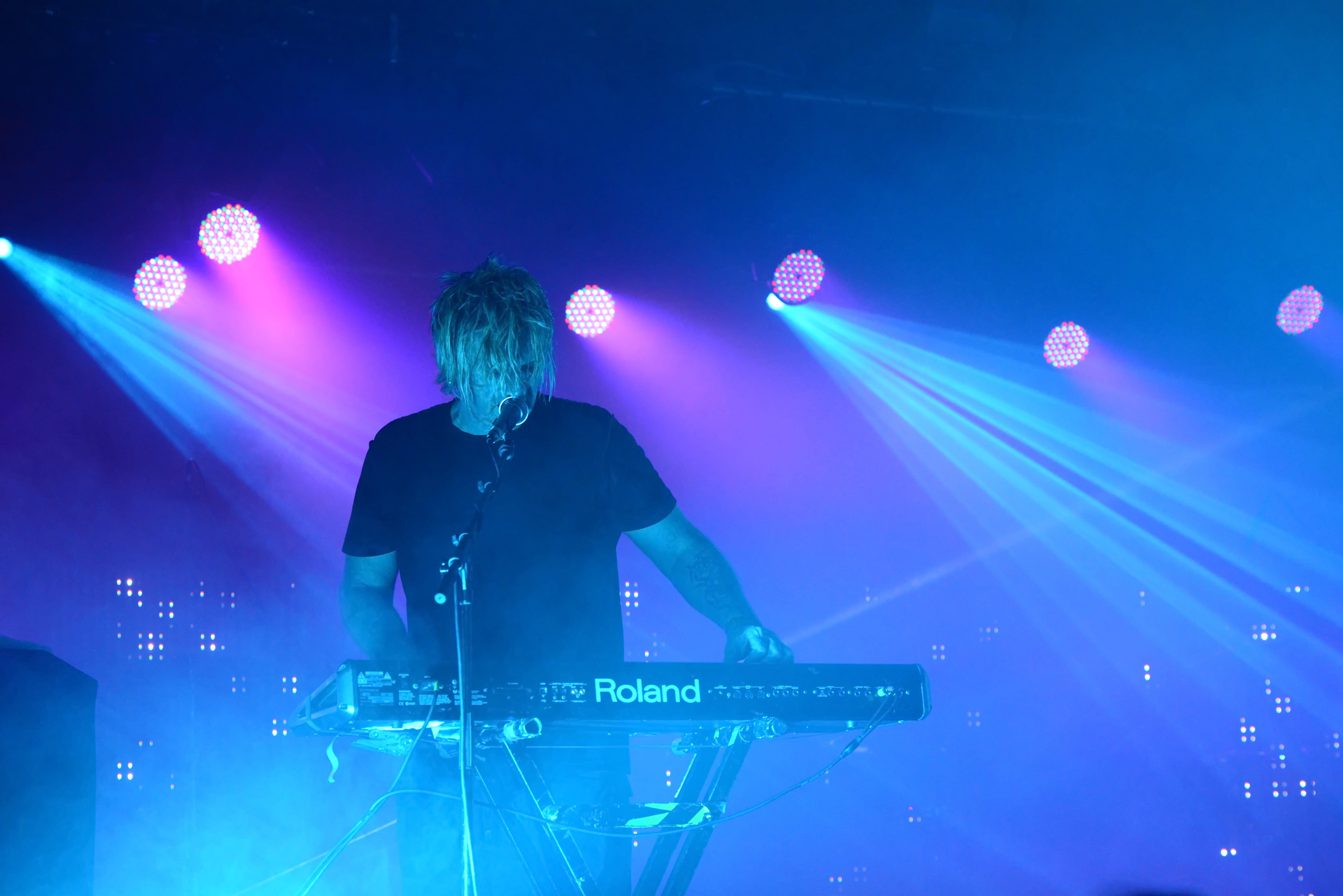 Project Pitchfork, Amphi festival 2014